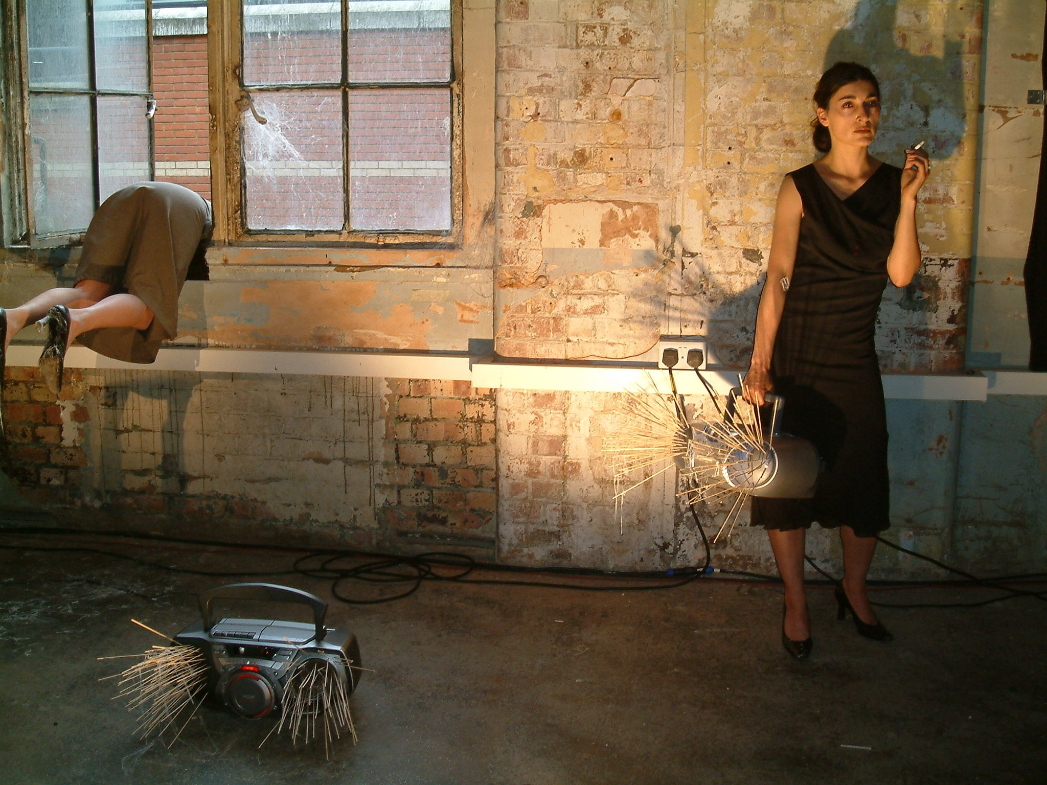 המיצג I would like to say sorry של A2Company